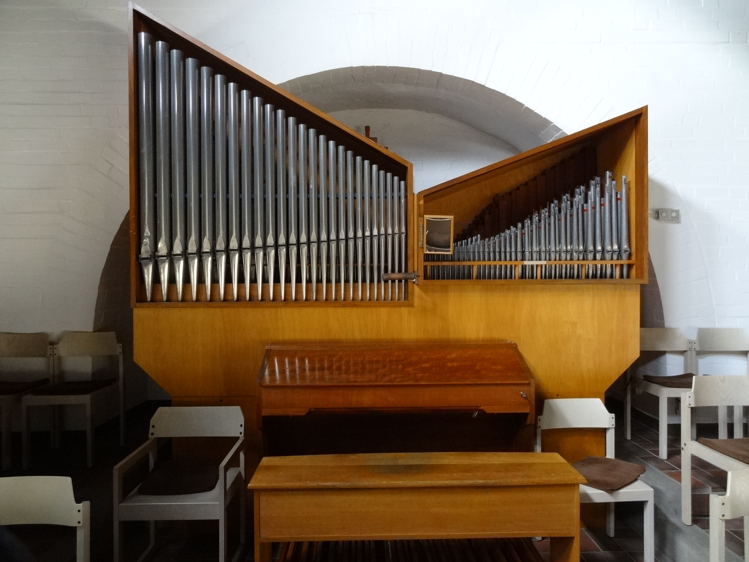 Evangelische Kirche (Hörnsheim)